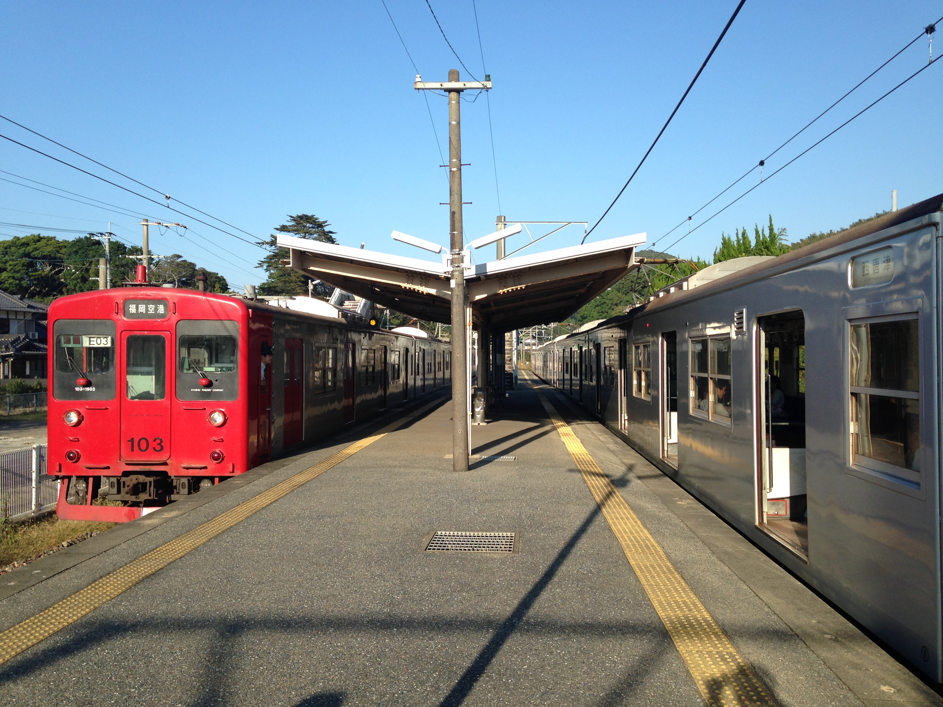 鹿家駅ホームと筑肥線列車(左側は福岡空港行き、右側は西唐津行き)